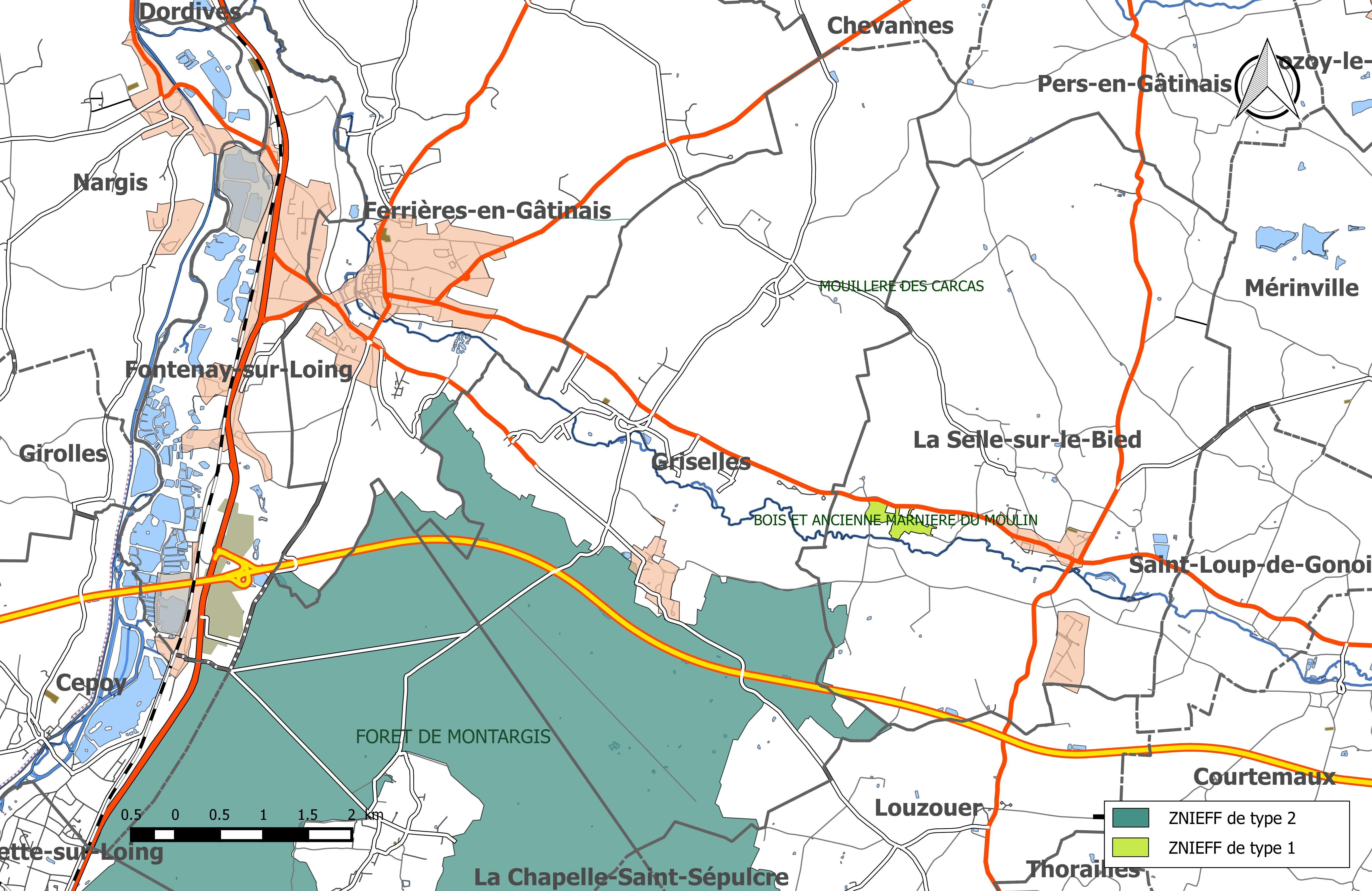 Carte des Zones naturelles d'intérêt écologique faunistique et Floristique (ZNIEFF) de la commune de Griselles (Loiret).